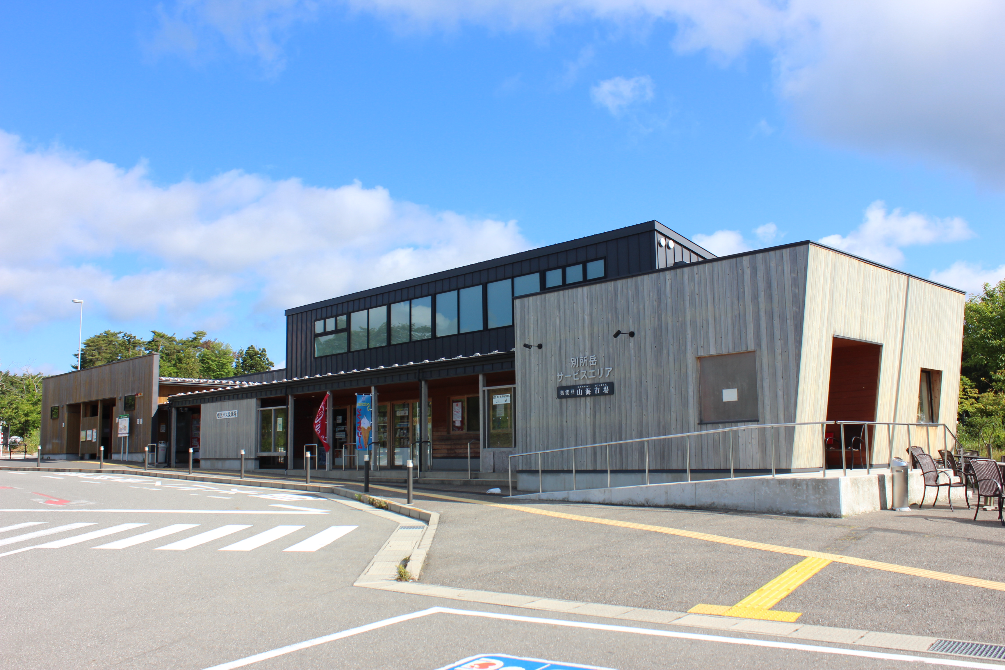 のと里山海道別所岳サービスエリア（石川県七尾市）。「奥能登山海市場」の名称が付けられている。 Canon EOS Kiss X5